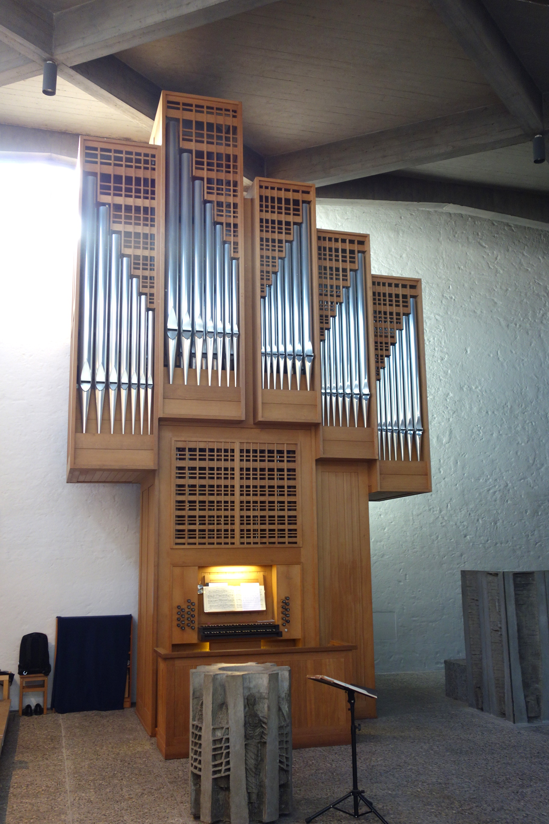 Orgel der Friedrich-von-Bodelschwingh-Kirche, Lübeck, Schleswig-Holstein, Deutschland